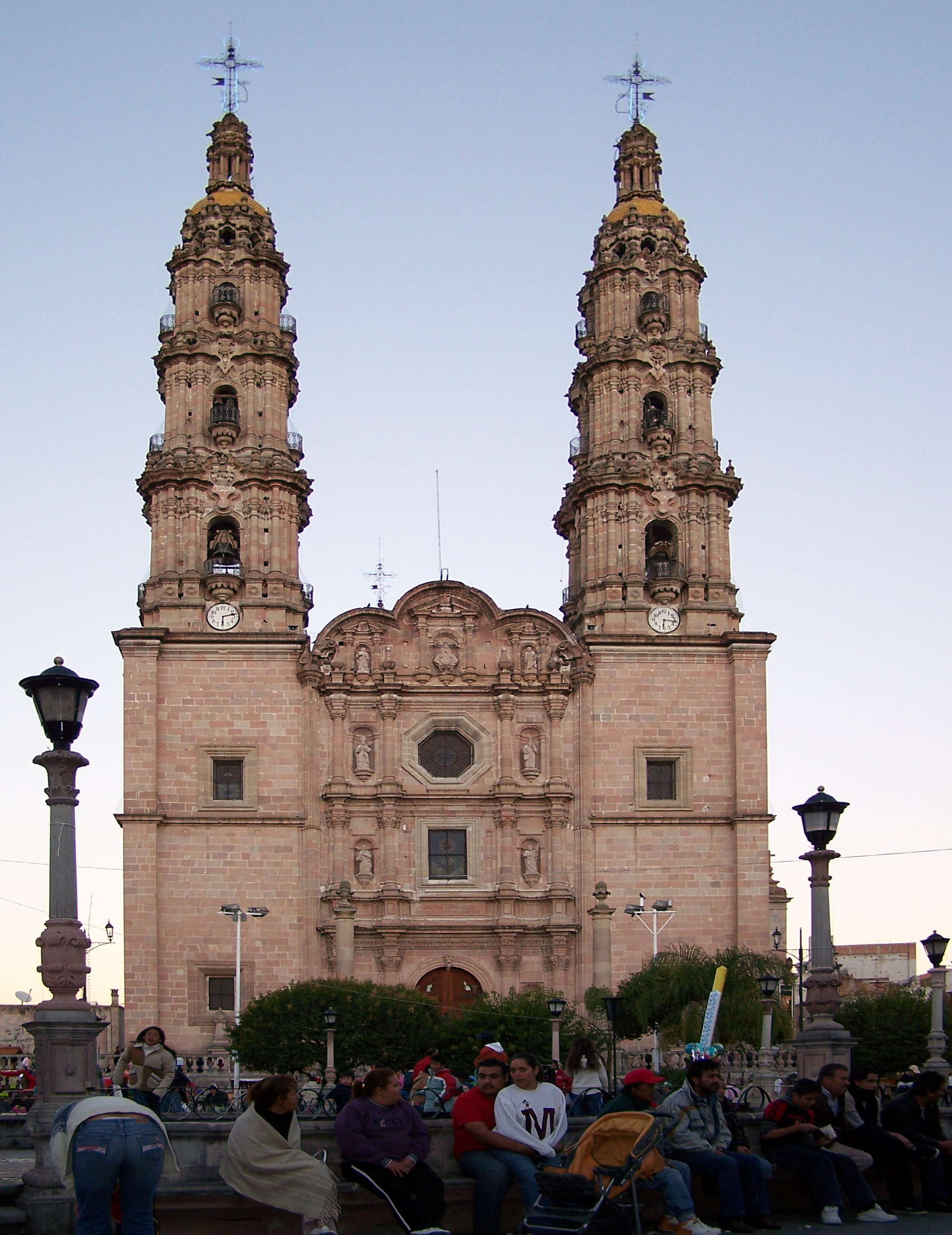 Basílica de San Juan de los Lagos (Jalisco, México), donde se encuentra la Virgen de San Juan de los Lagos.